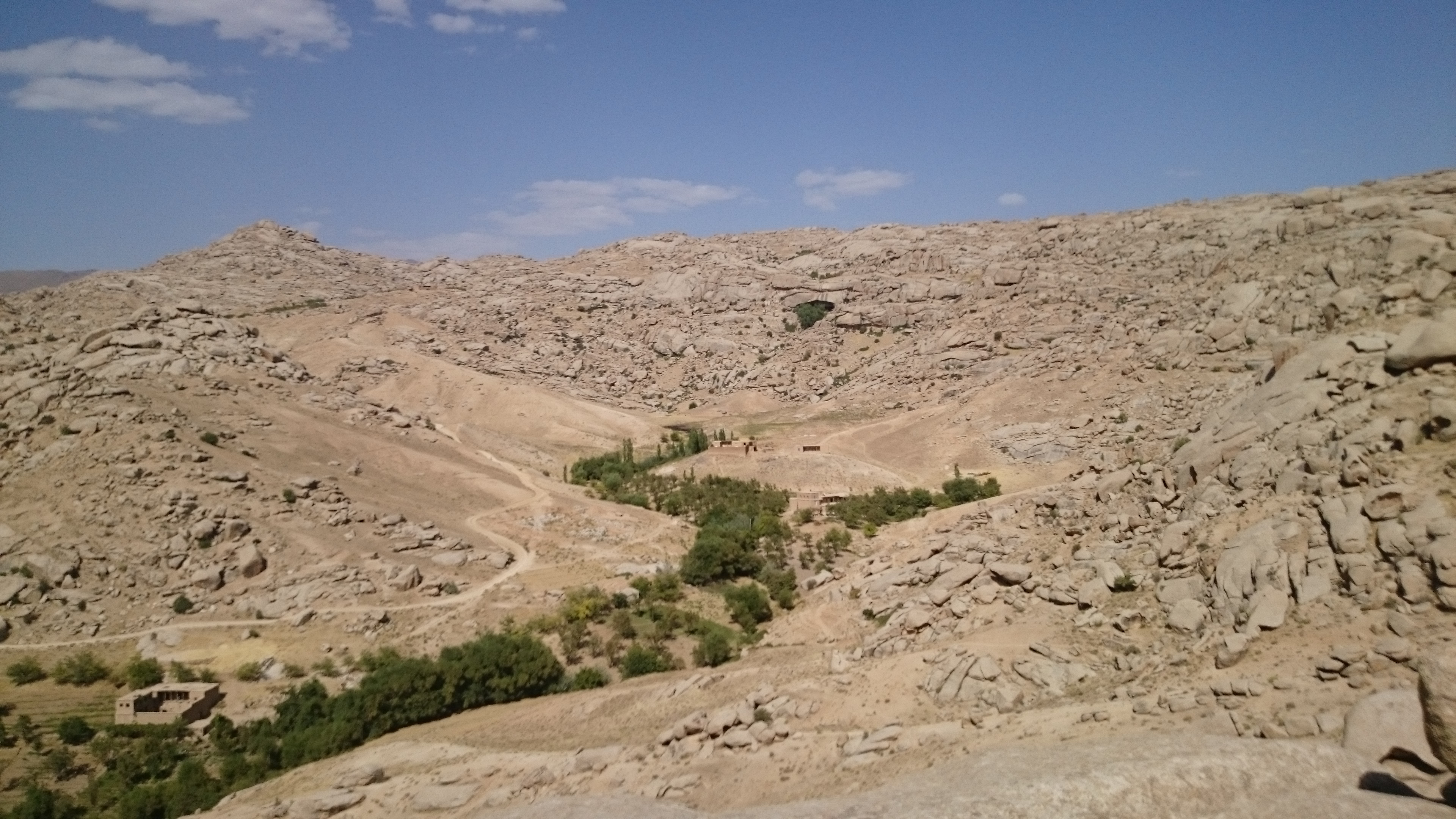 عکس از منطقه سوختگ نیلی